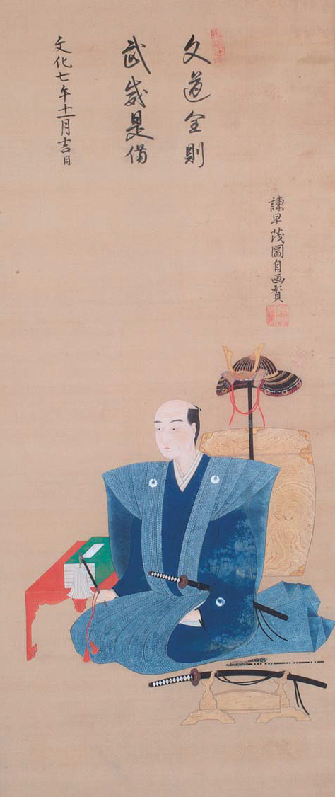 諫早茂図の肖像。